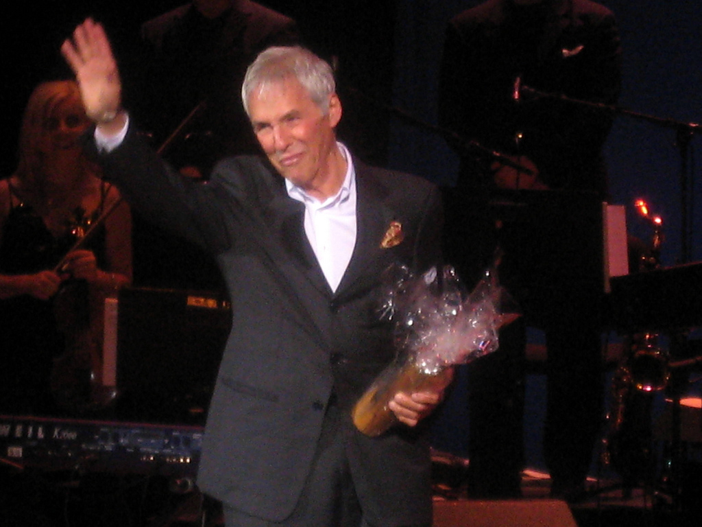 Burt Bacharach in Antwerpen.